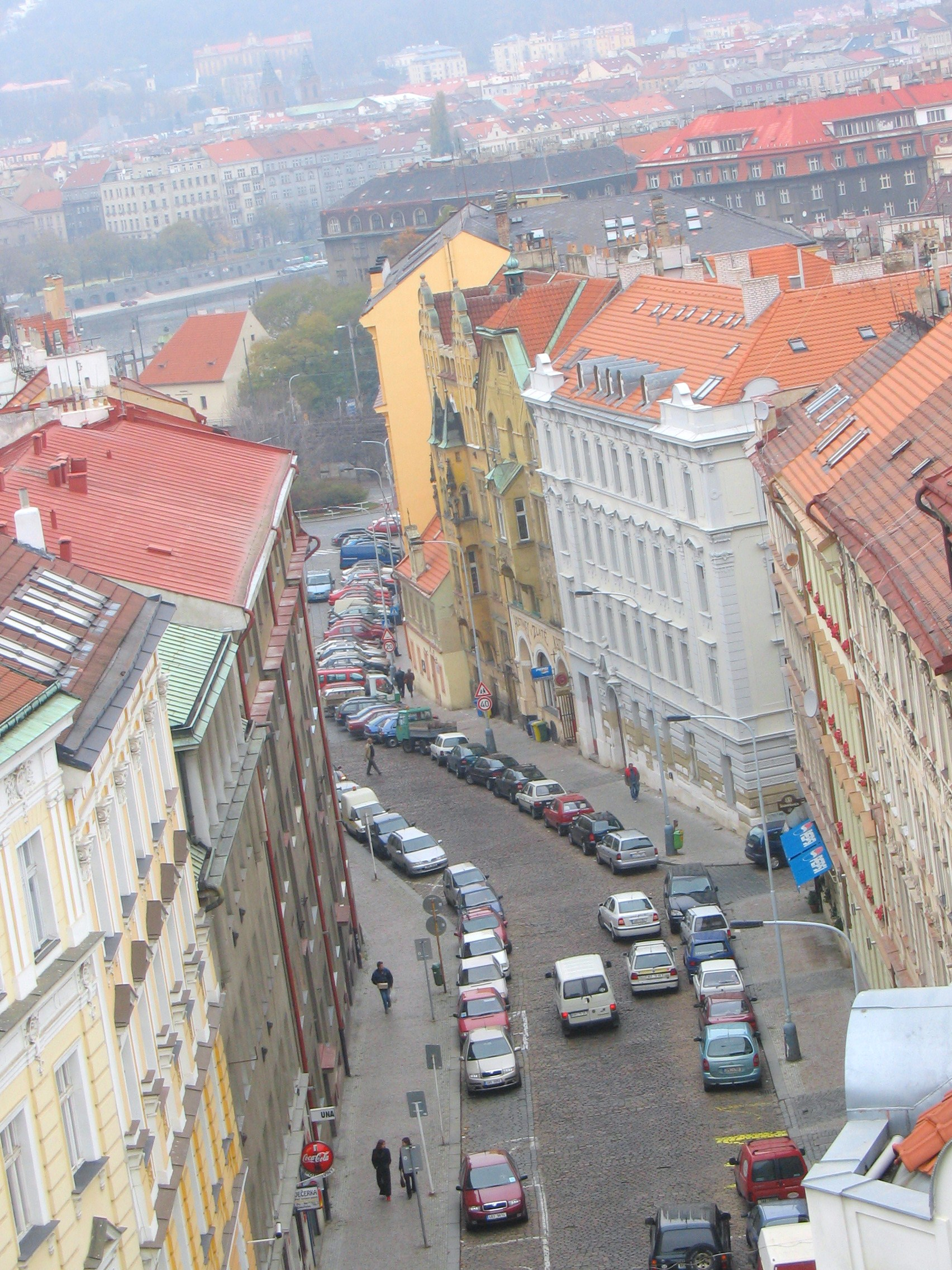 Вид на улицы Нове места со стен Вышеграда